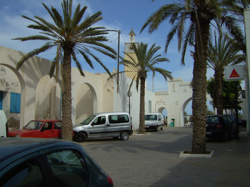 Zarzis